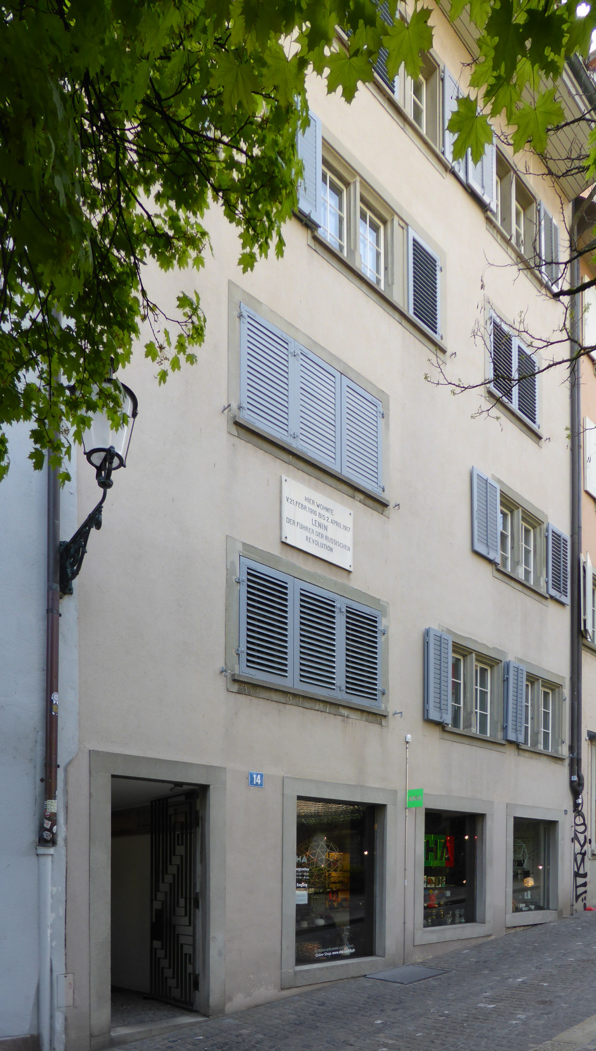 Spiegelgasse 14, 8001 Zürich